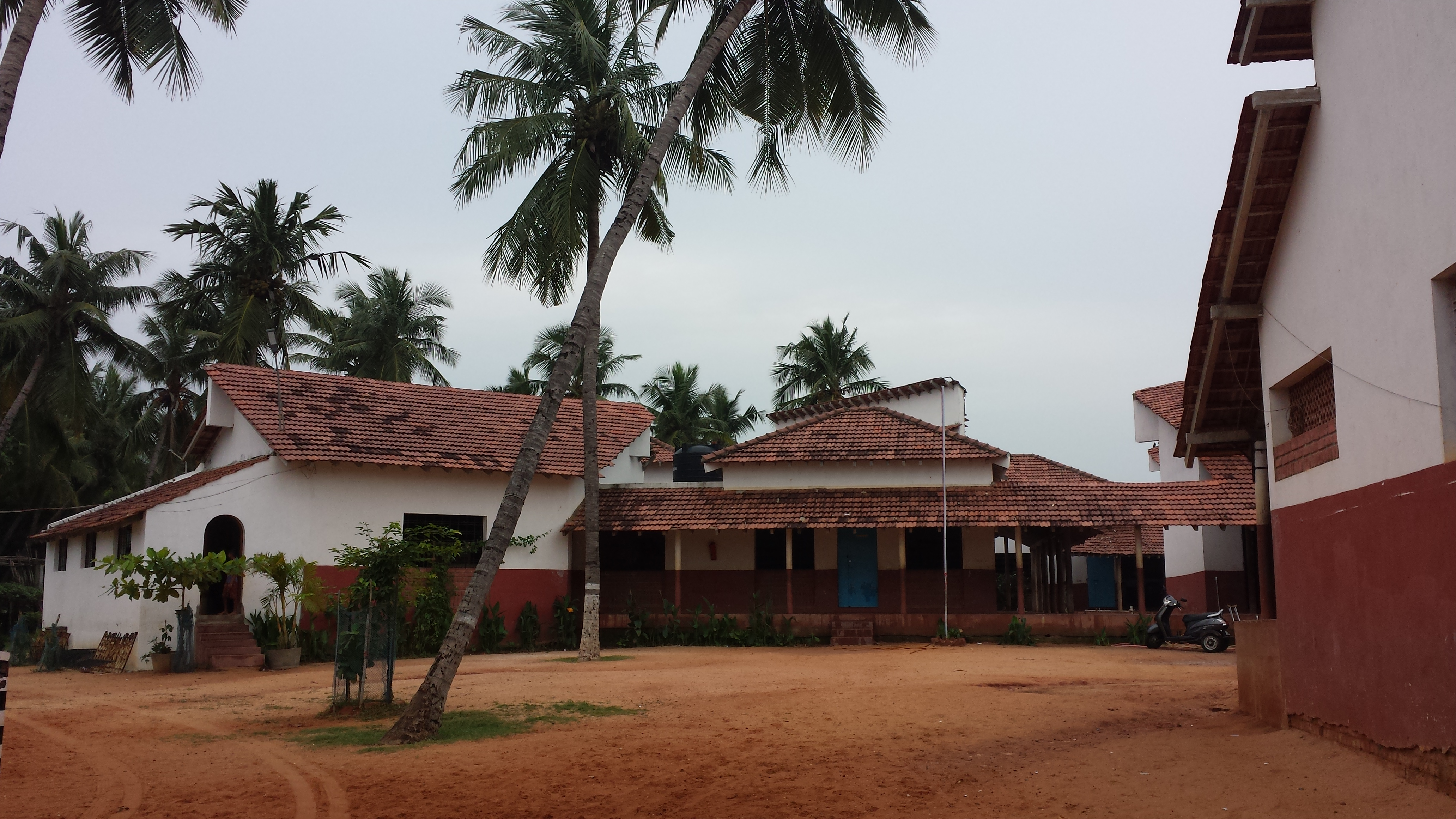 vue des infrastructures